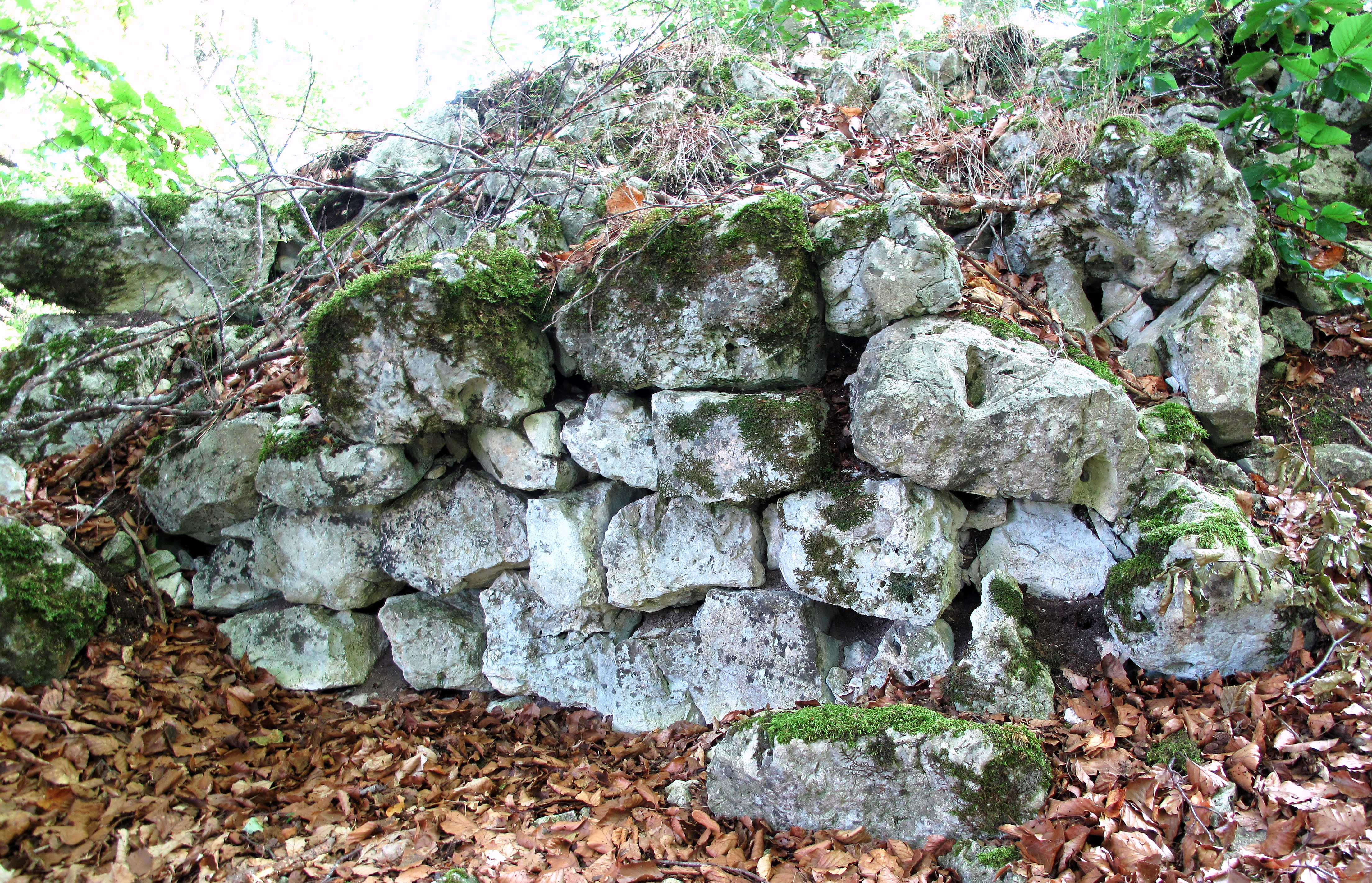 Mauerreste der Kernburg an der südöstlichen Felsflanke.